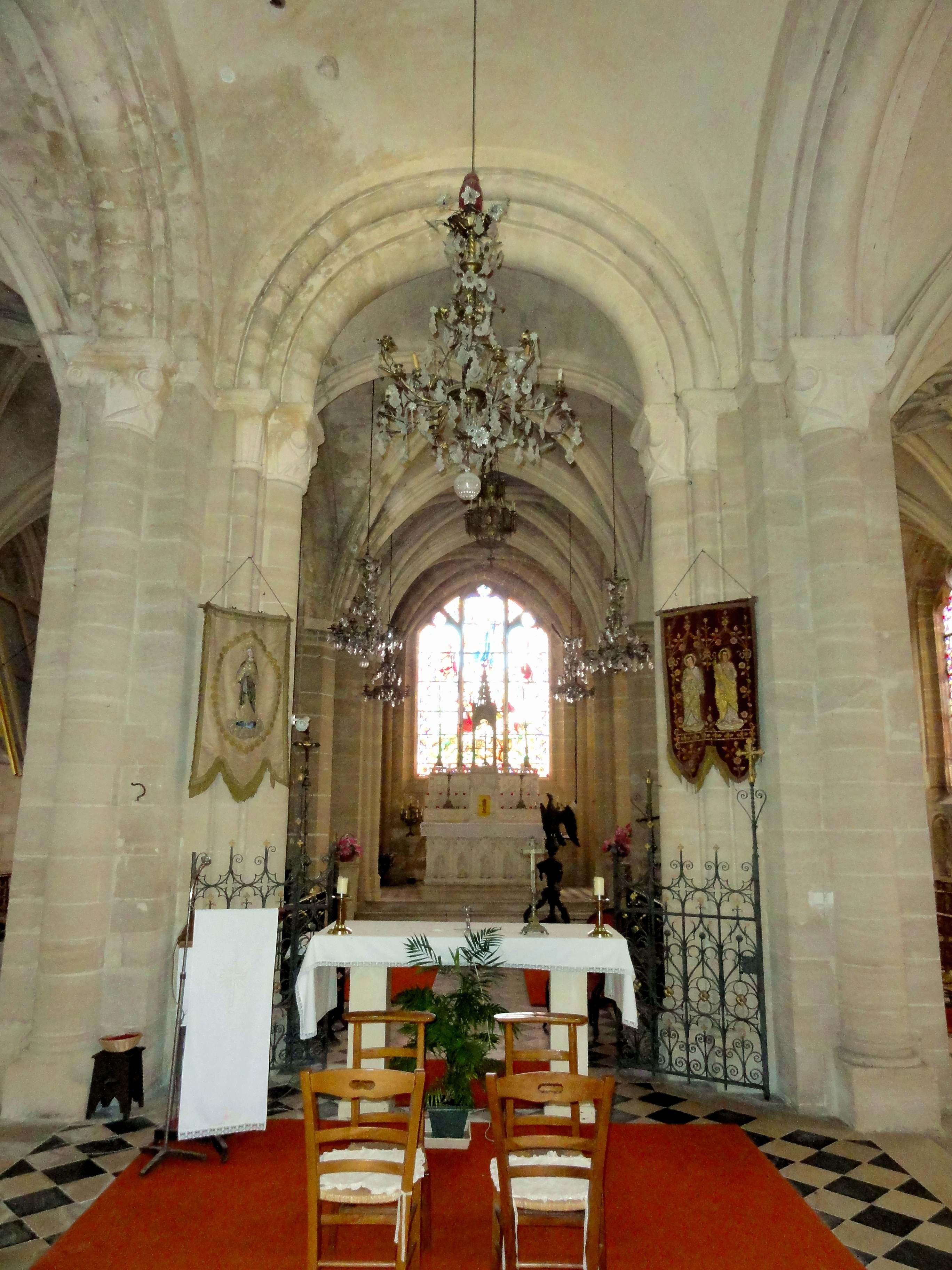 Intérieur de l'église (voir titre).